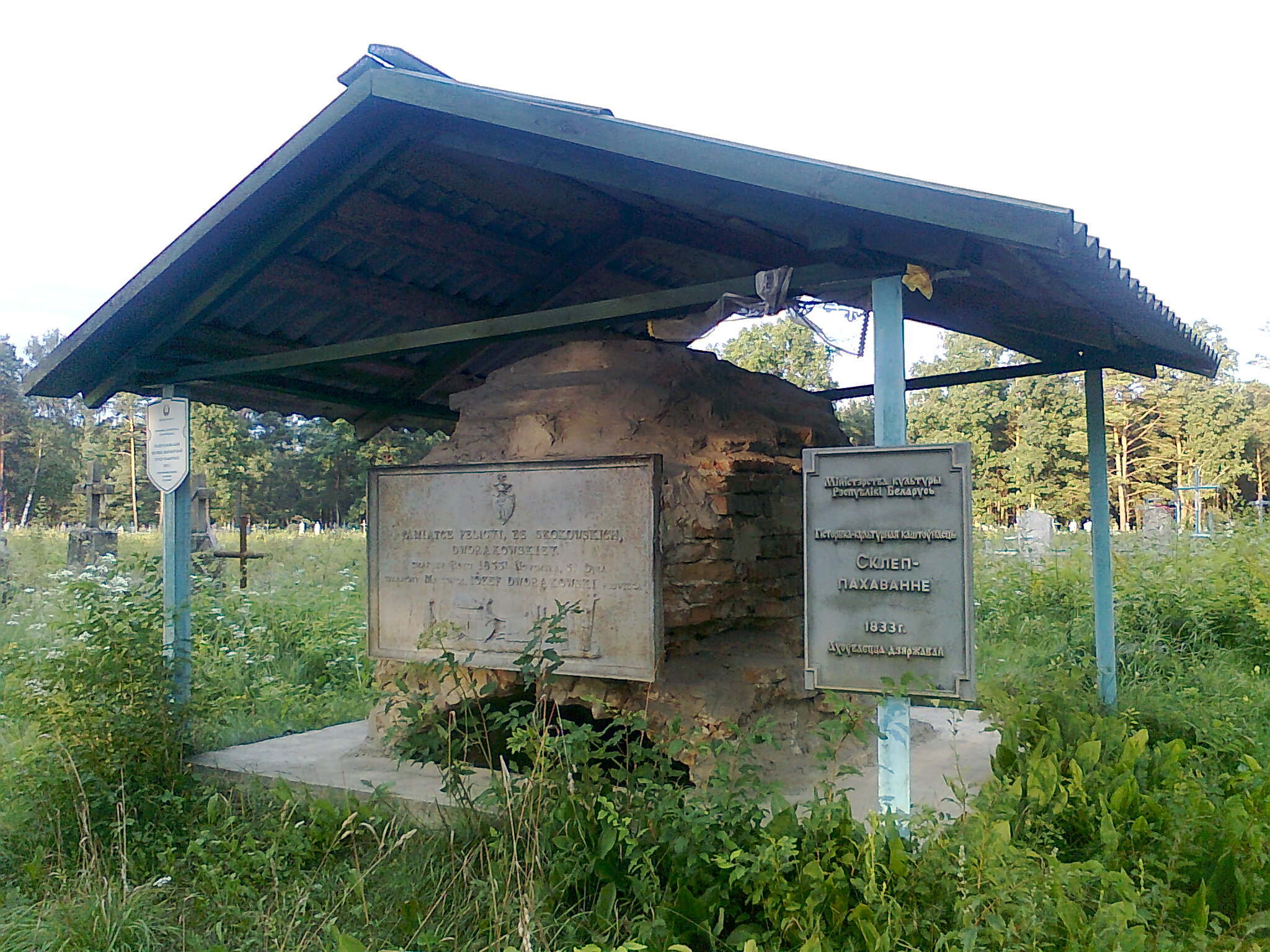 Беларуская (тарашкевіца): Склеп-пахавальня Феліцыі Дваракоўскай з роду Скакоўскіх. Бастынь This is a photo of Belarusian heritage monument. Reference number: 113Г000455 ( WLM)